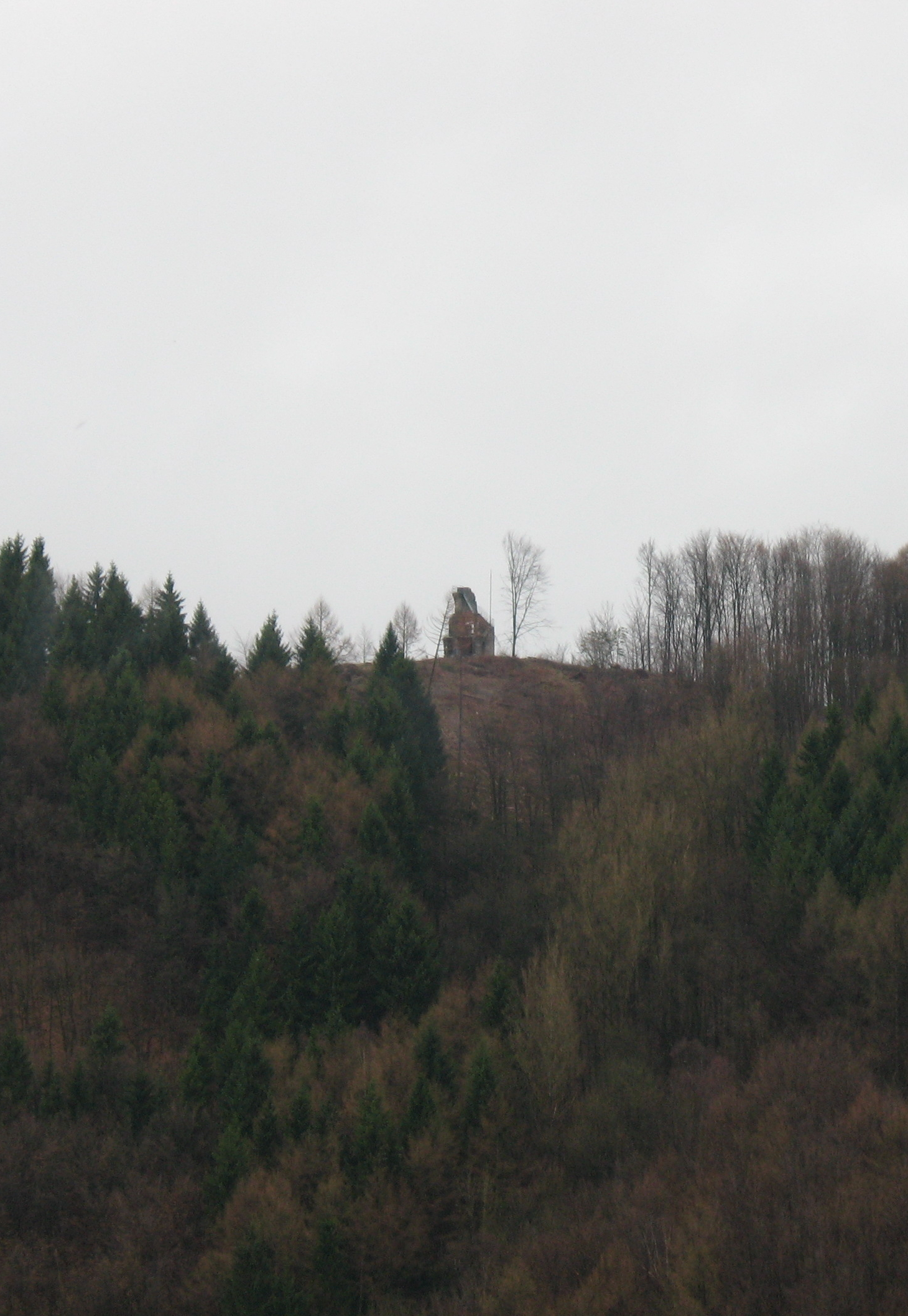 Blick auf den Meerhardtsturm in Gummersbach-Dieringhausen